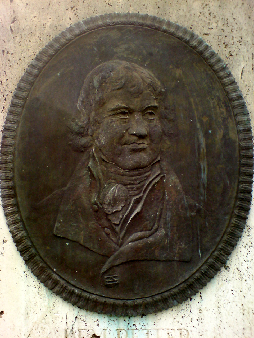 Portrait-Medaillon des Johann Gerhard Helmcke von Friedrich Adolf Sötebier an der Herrenhäuser Allee im Georgengarten Ecke Schneiderberg/Franzius-Institut